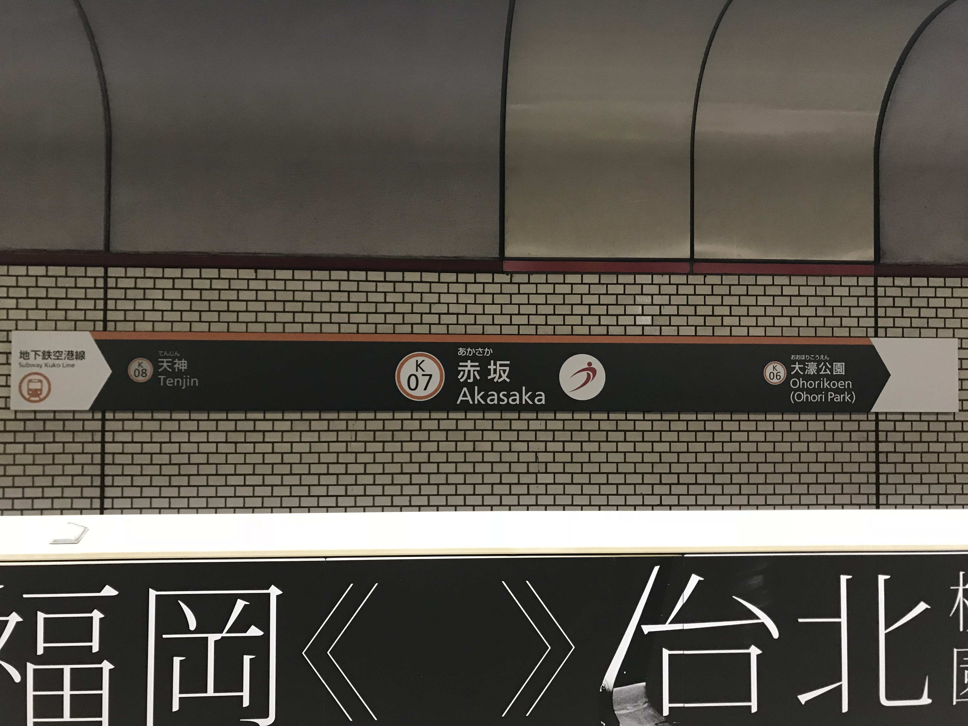 赤坂駅の駅名標。イラストは「福岡国際マラソン」